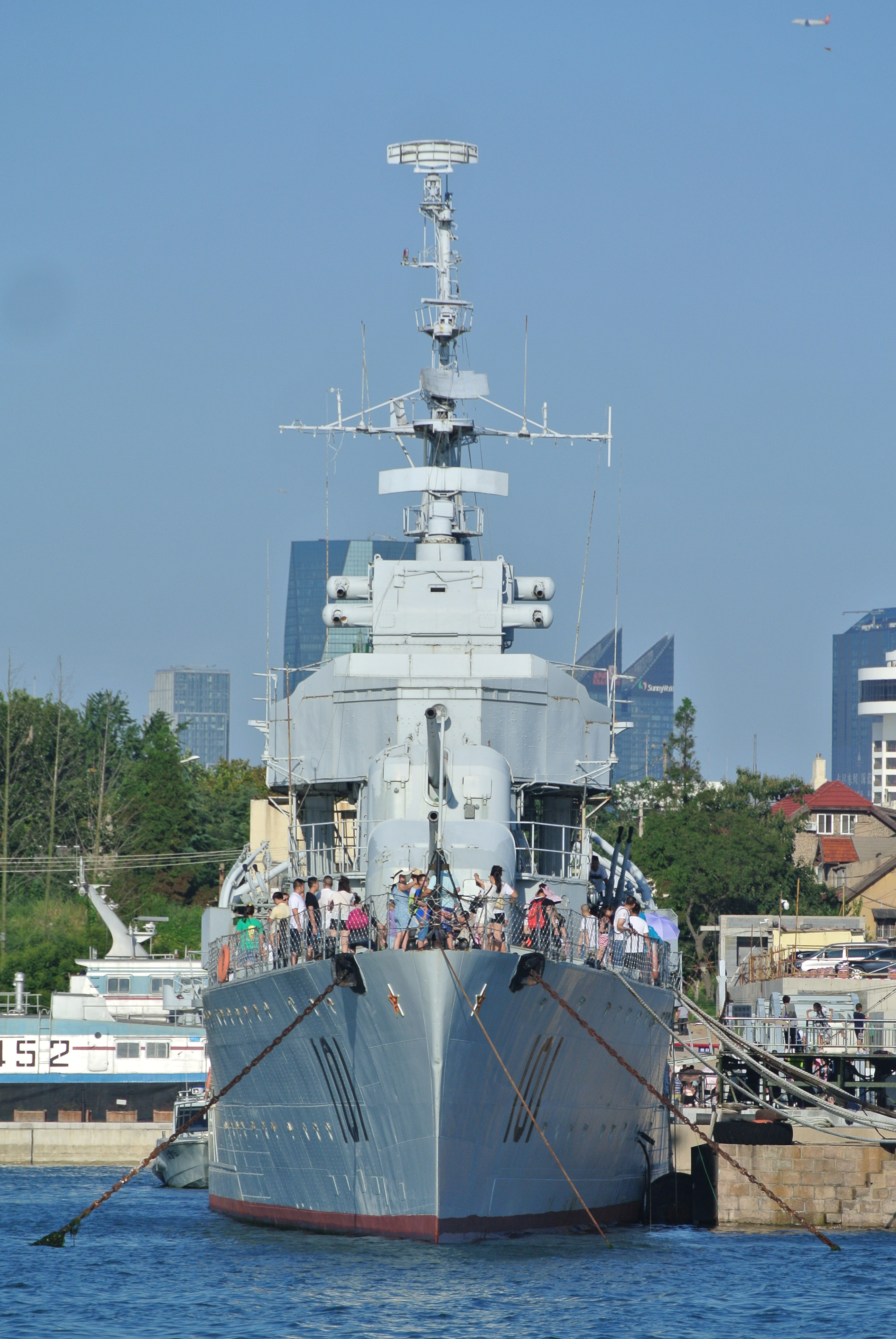 青岛中国海军博物馆鞍山号驱逐舰